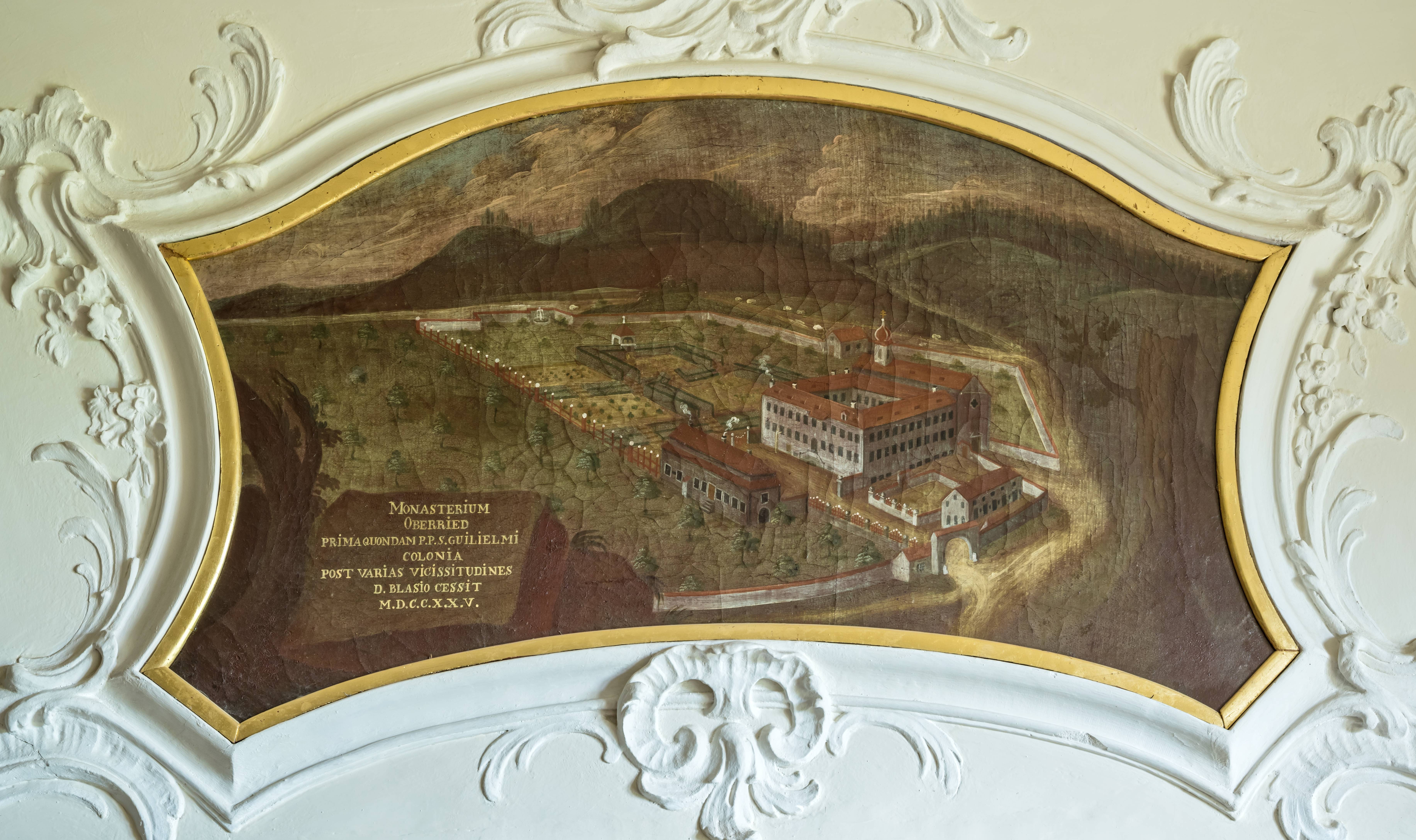 Bilder aus dem Schloß Bürgeln Hier Bilder von den Supraporten im ersten Stock des Schloßes. Es sind Bilder der Probsteien des Kloster St. Blasien und einige Füllbilder in einem später erstellten Flügel MONASTRIUM OBERRIED PRIMA QUONDAM P.P.S. GUILIELMI COLONIA POST VARIAS VICISSITUDINES D. BLASIO CESSIT M.D.C.C.X.X.V.